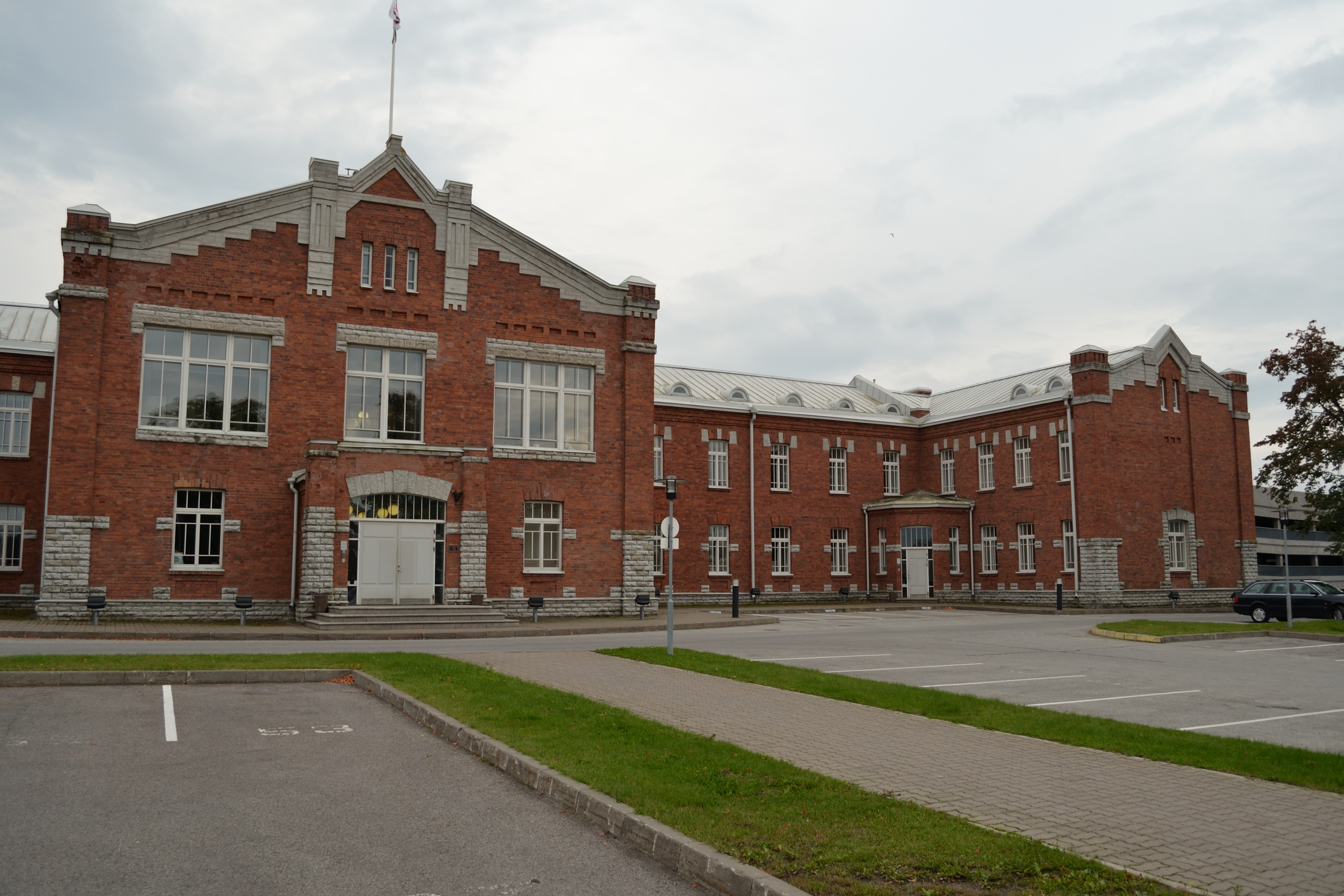 Tondi sõjaväelinnaku staabihoone Tammsaare tee 25, 1915–1916